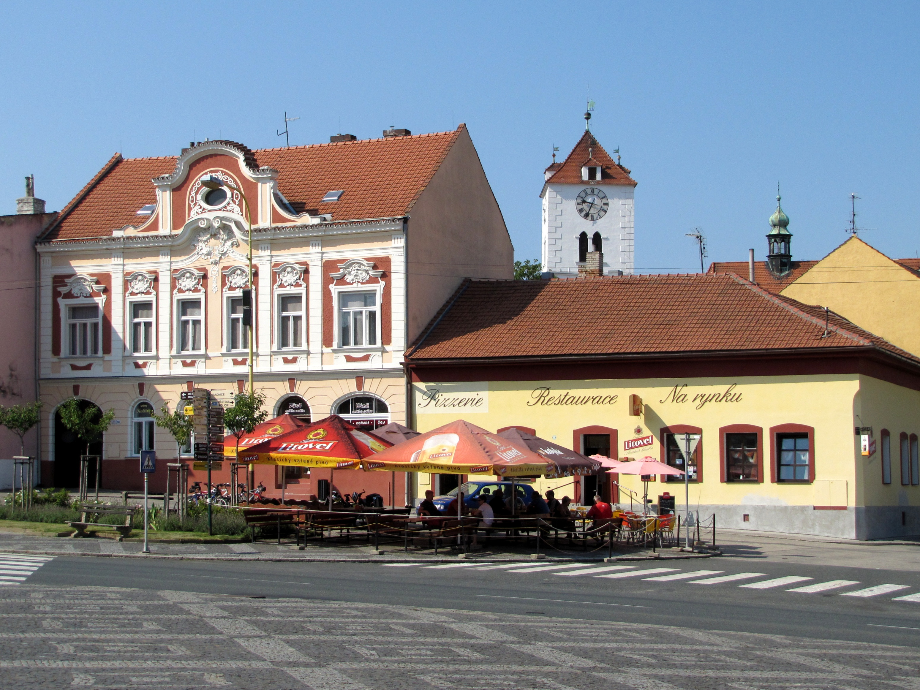 Strážnické náměstí vybudované po husitských válkách jako základ Nového Města. V pozadí Bílá věž u kostela sv. Martina.